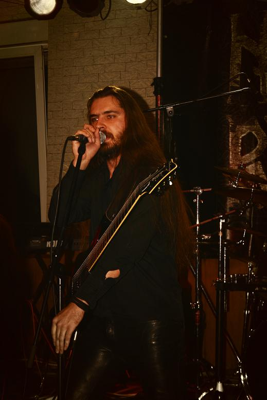 Hupogrammos Disciple's, Gitarrist/Sänger von Negură Bunget. live im Einsidel, Zella Mehlis